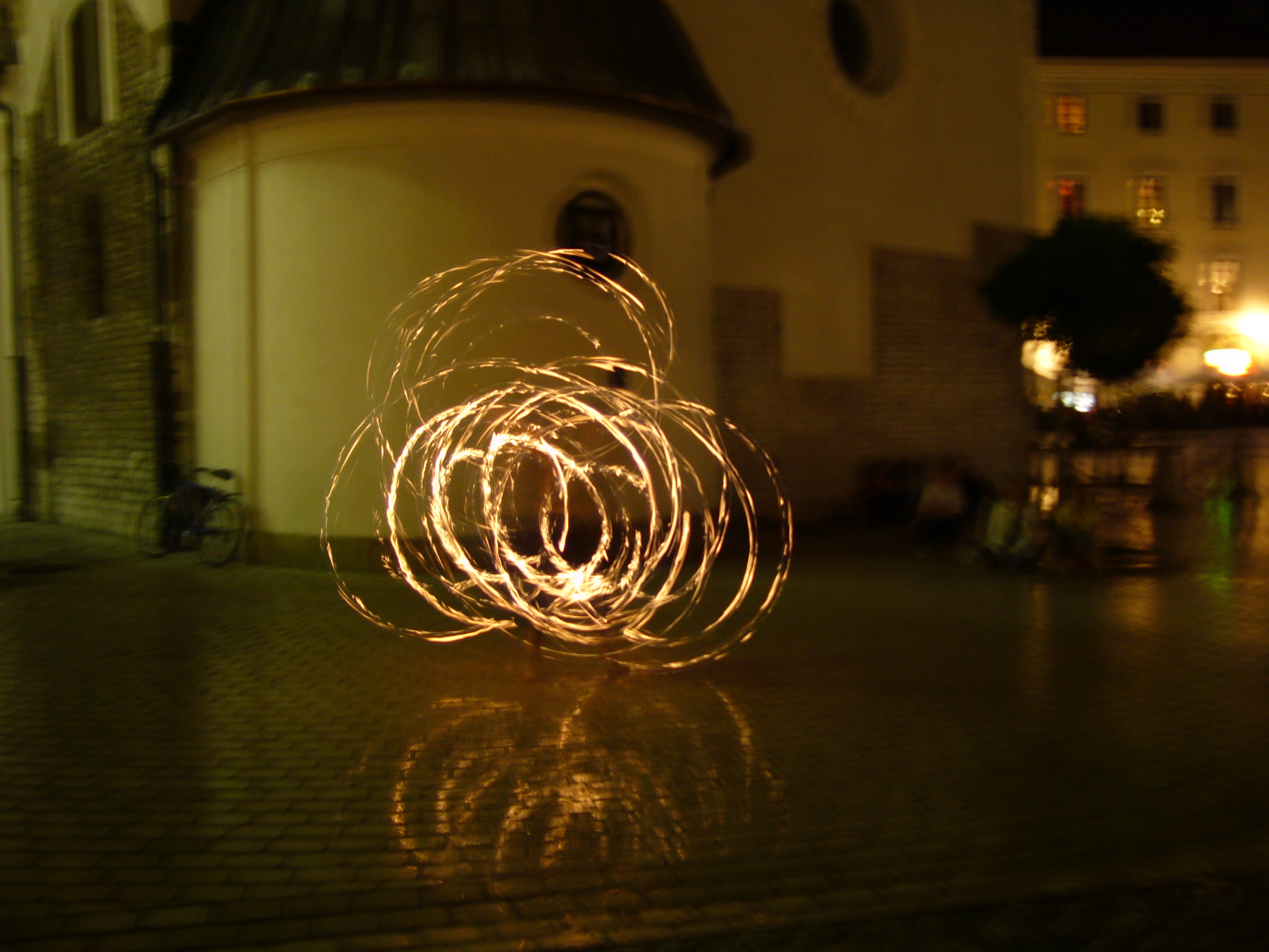 Juggler.